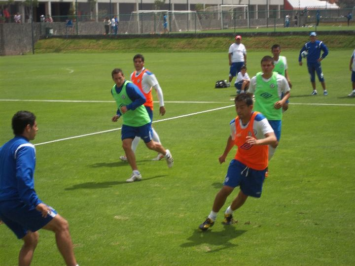 Christian el "Chaco" Giménez entrenando en la Noria, 2011.